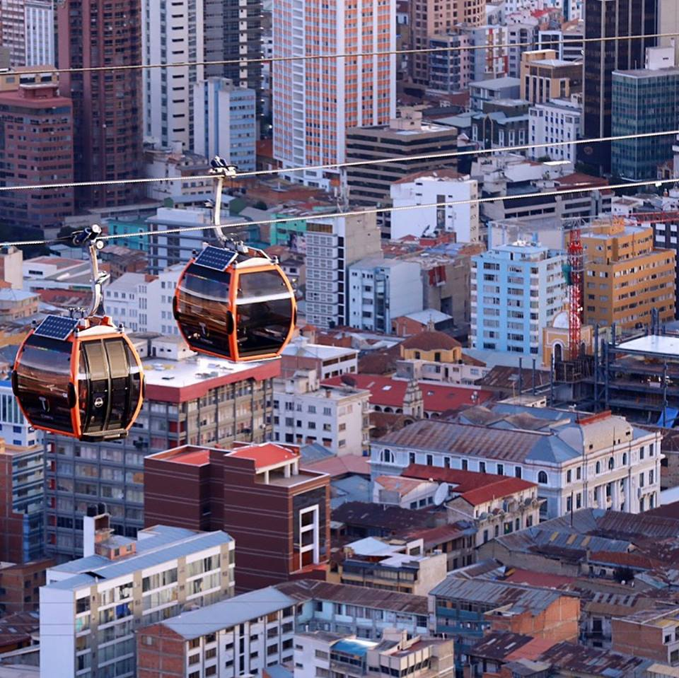 Mi Teleférico - Linea Naranja